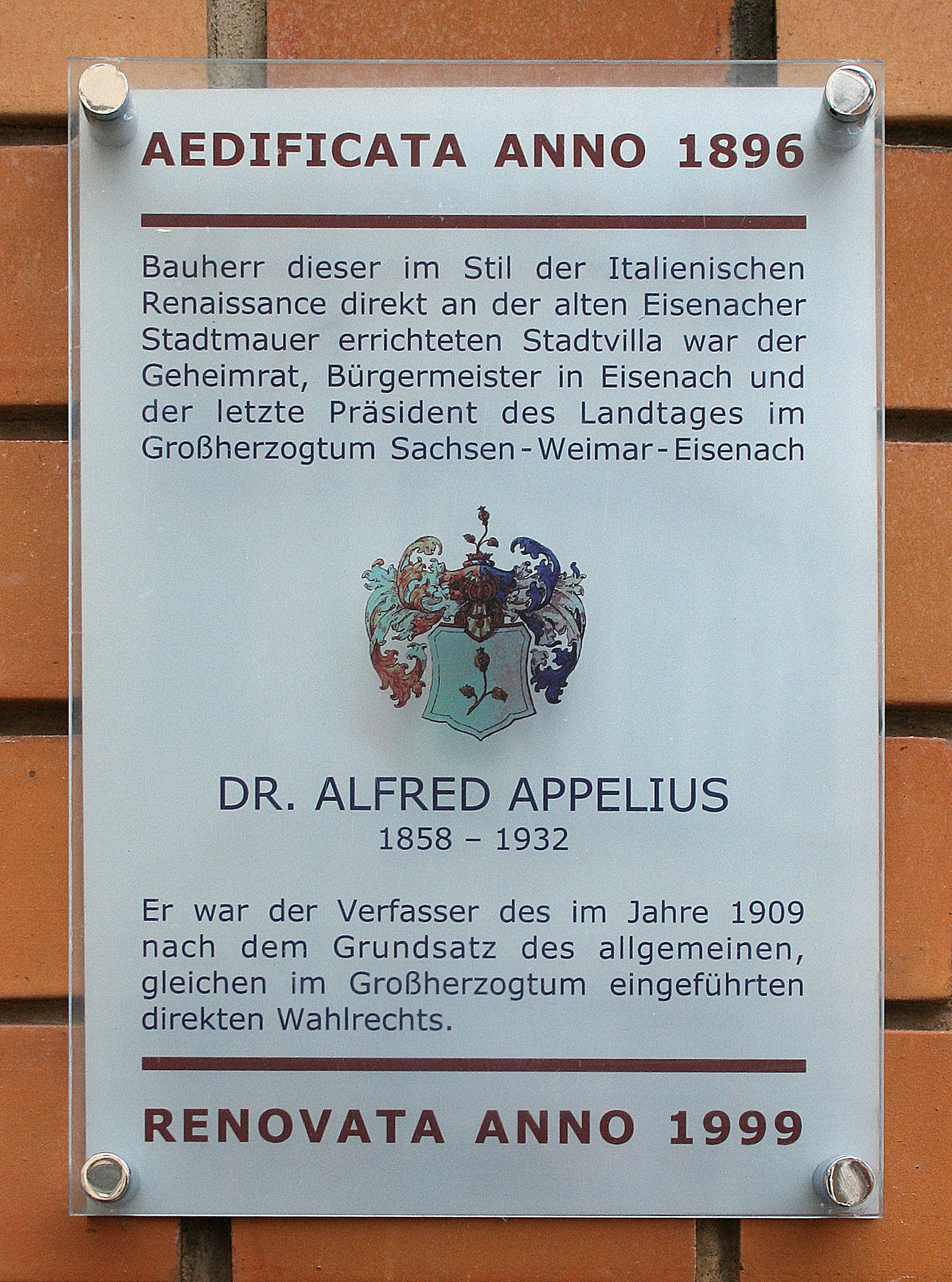 Gedenktafel für den Bauherren des Hauses Marienstr. 21 in Eisenach/Thüringen, Alfred Appelius